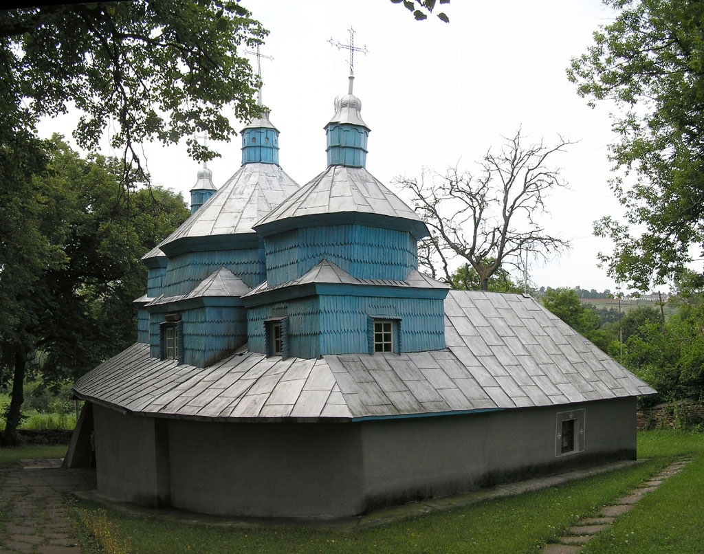 Церква Успіння Богородиці, c. Кошилівці Заліщицького району Тернопільської області.